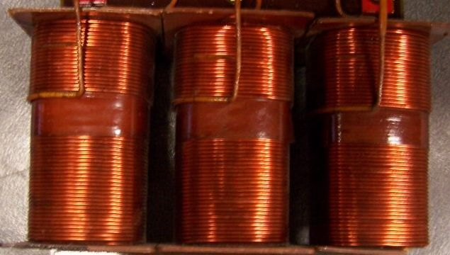 Photographie personnelle des enroulements d'un transformateur triphasé par david bya Licensing